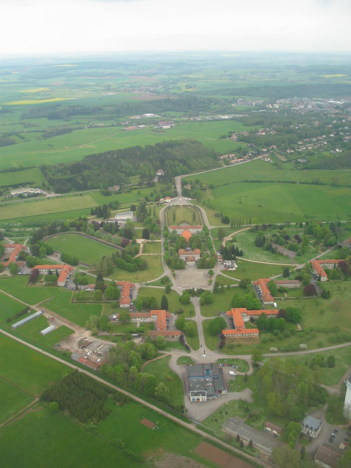 Centre Hospitalier Spécialisé départemental orienté psychiatrie situé sur la commune de Mirecourt. Licensing Catégorie:image de psychologie